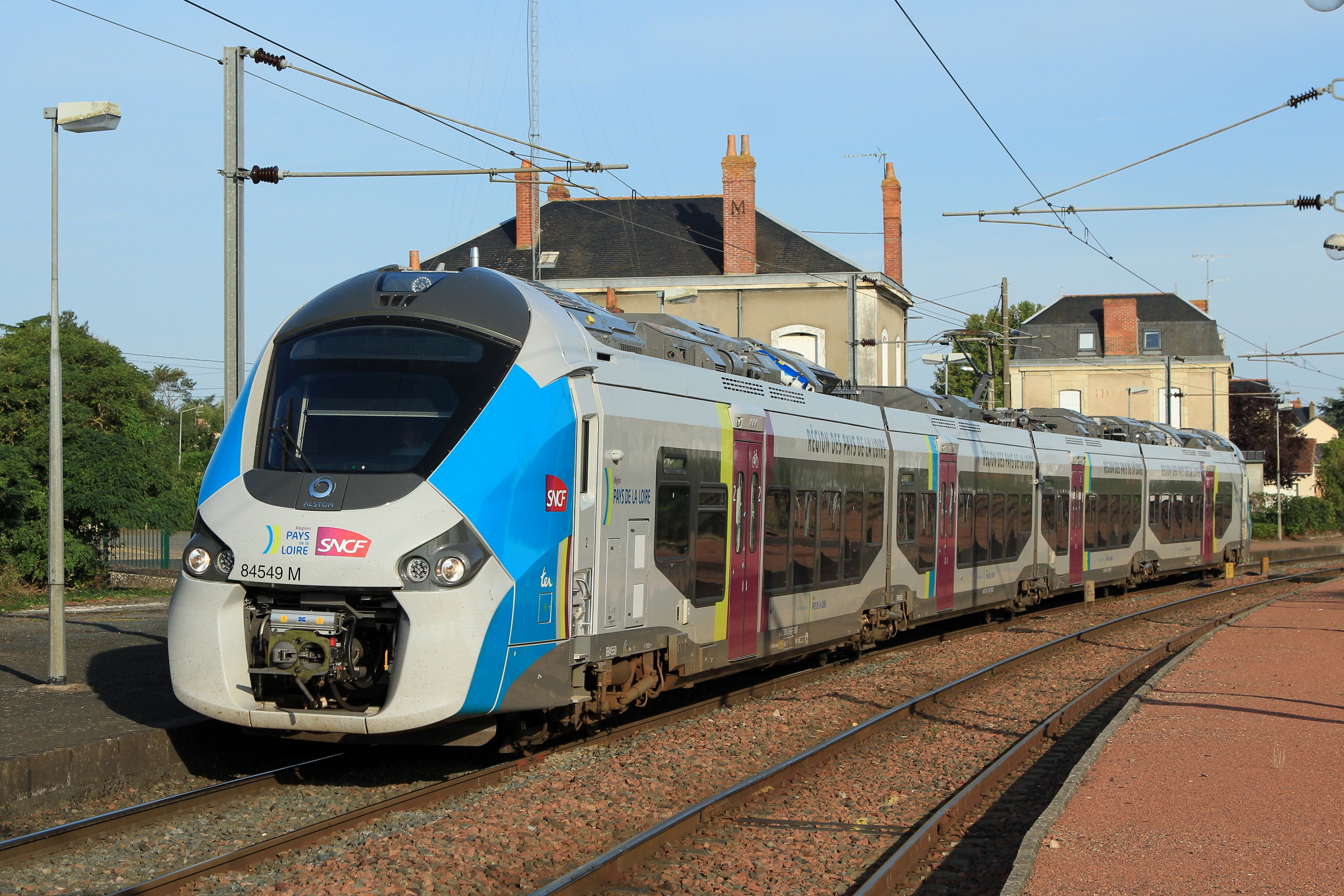 Le Régiolis bi-mode B 84549 en livrée TER Pays de la Loire repart de la gare de Montreuil-Bellay, en Maine-en-Loire (France). Il assure le train des plages Saumur - Les Sables-d'Olonne (TER 859081).